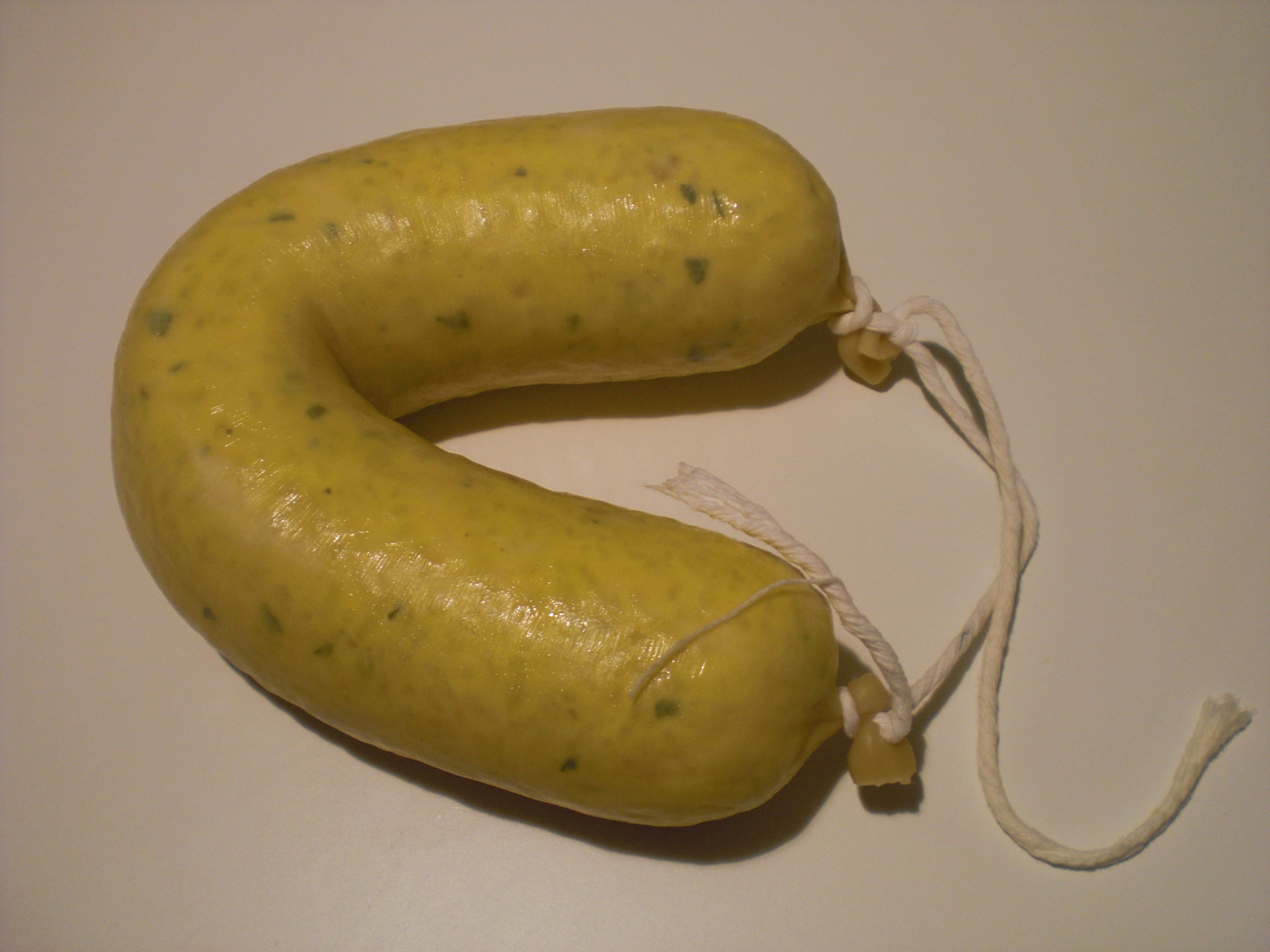 Mondeju zuria.